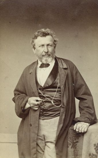 Pierre Jean Édouard Desor